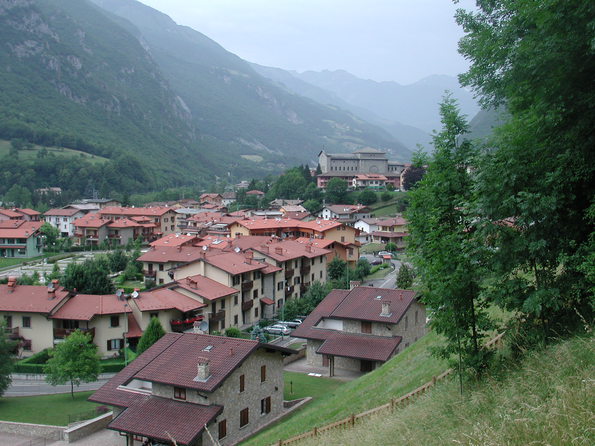 Val Seriana, Italy